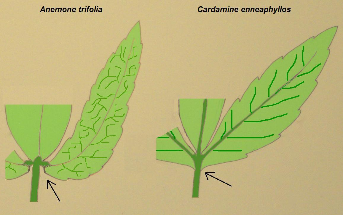 Anemone trifolia – Confusione specie